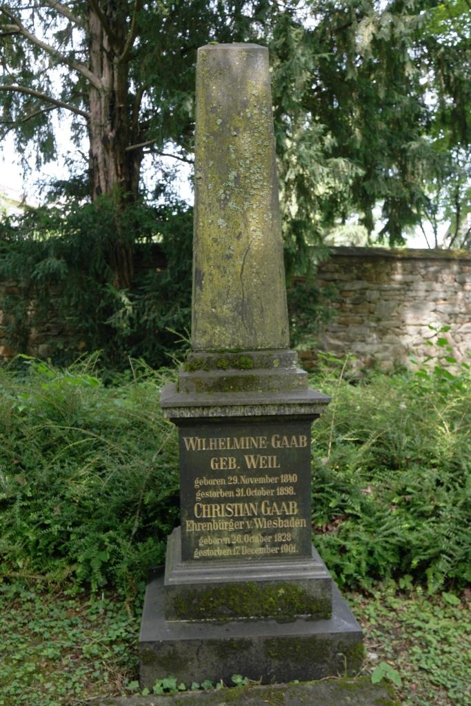 Grab des Lokalpolitikers Christian Gaab, 1828-1901, auf dem Alten Friedhof in Wiesbaden